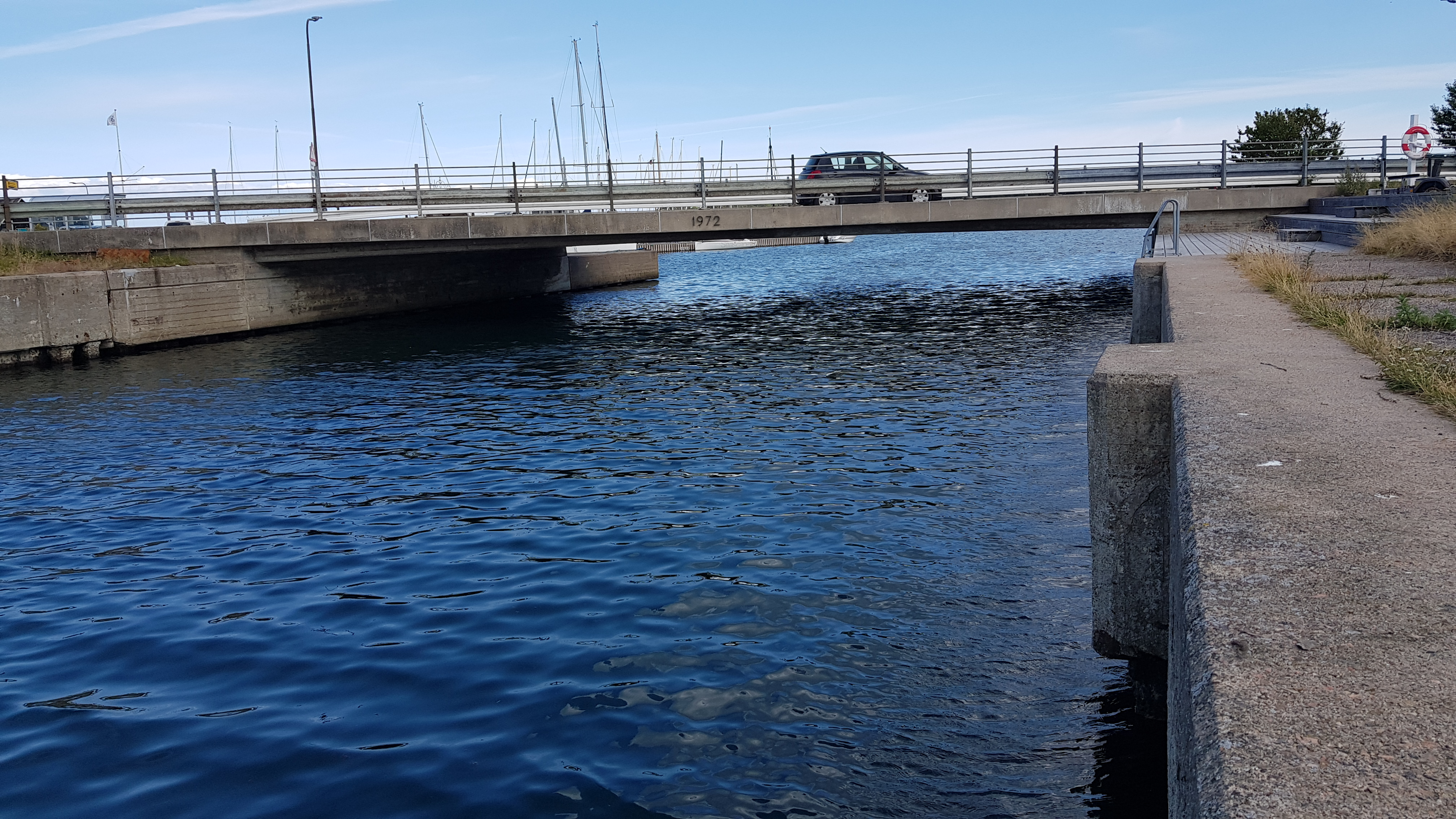 Broen over Hejls Nors munding